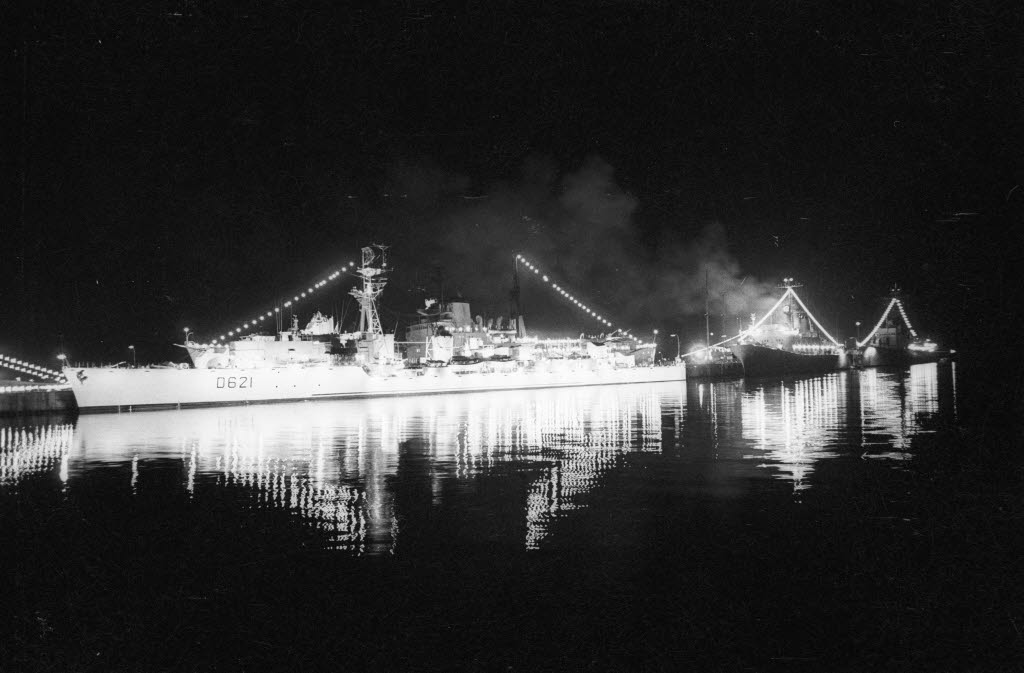 Im Vordergrund der Zerstörer SURCOUF (D 621, franz.).